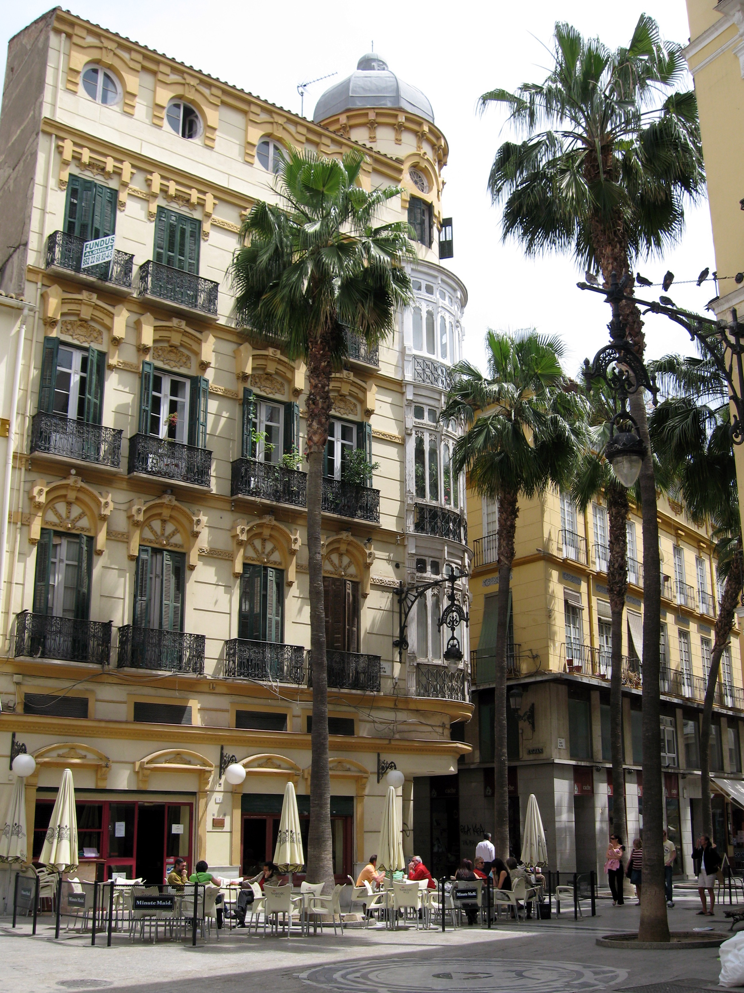 Altstadt von Málaga, Andalusien, Spanien